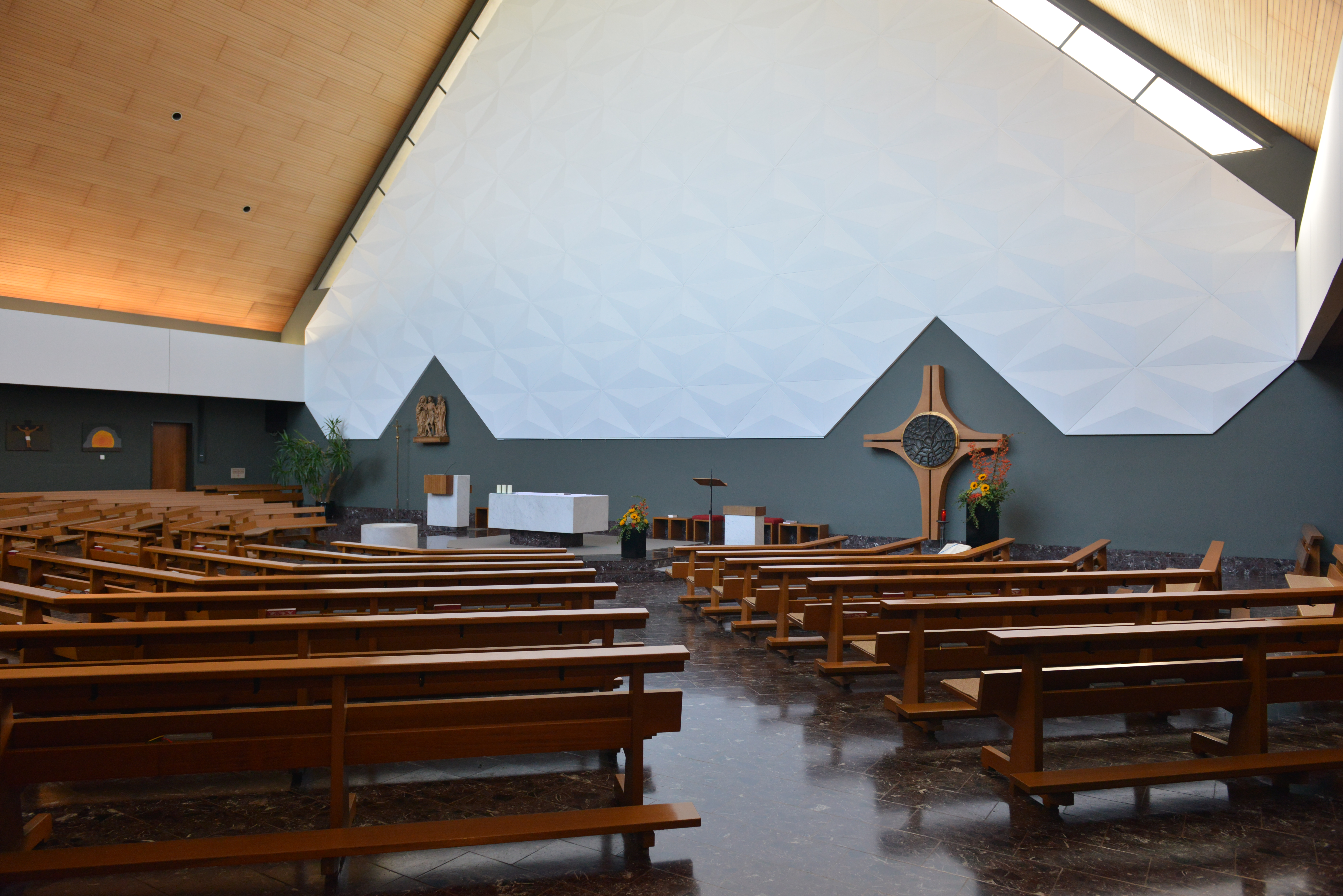 Neue Pfarrkirche hll. Kornelius und Cyprian am Alberweg 1 in Tosters, Feldkirch.